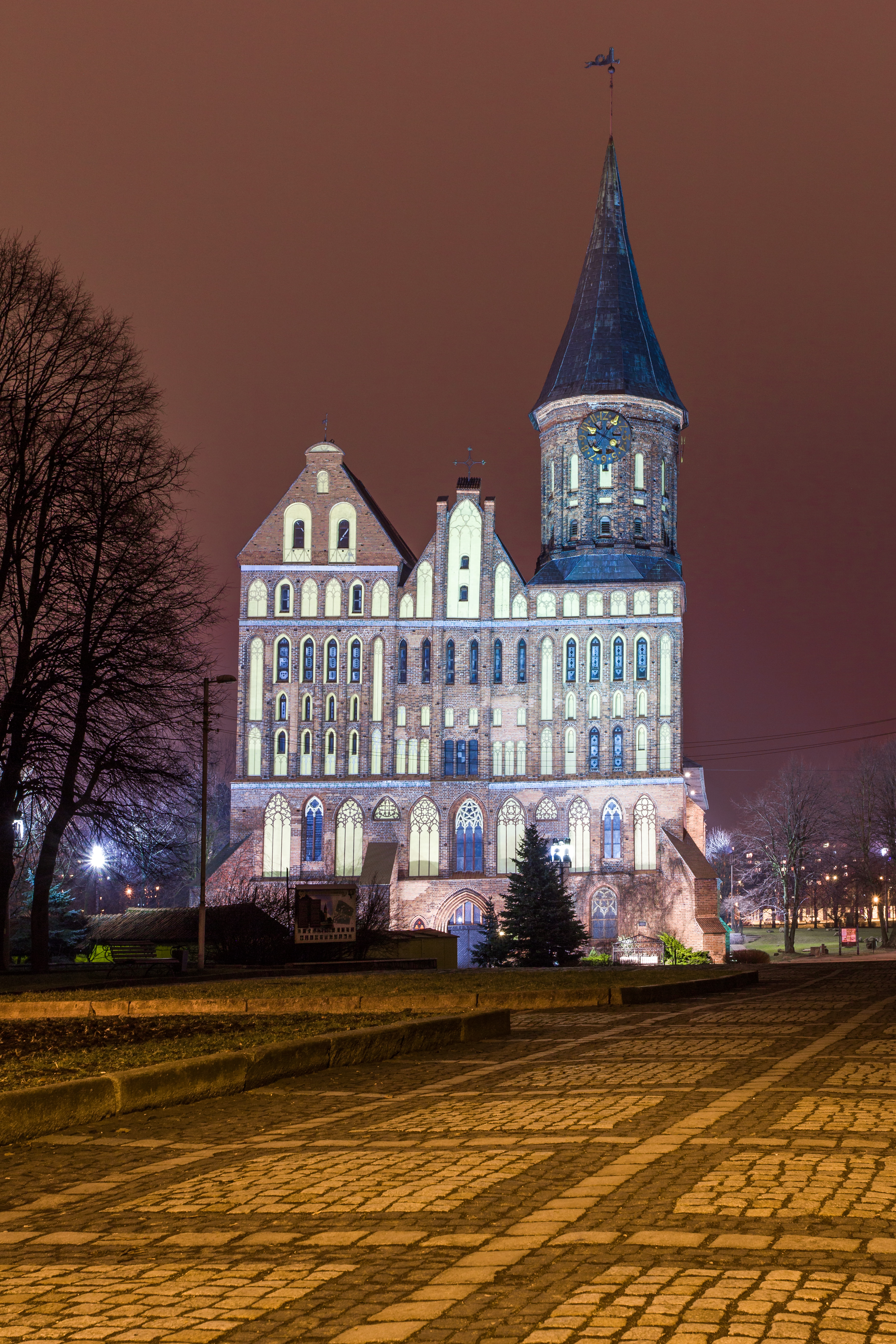 Кафедральный собор: остров Канта, Калининград, Калининградская область